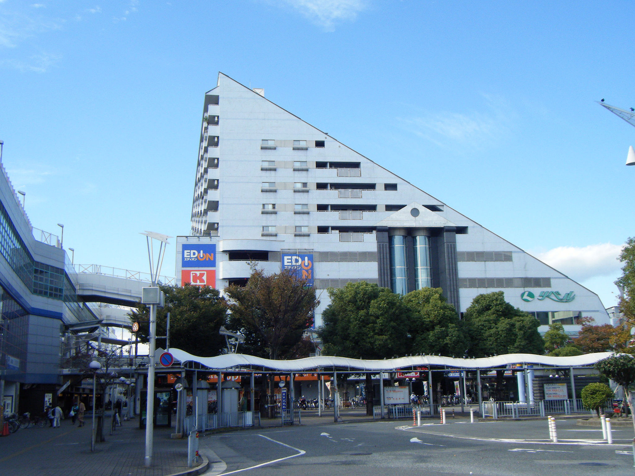 出屋敷駅前 リベル 外観